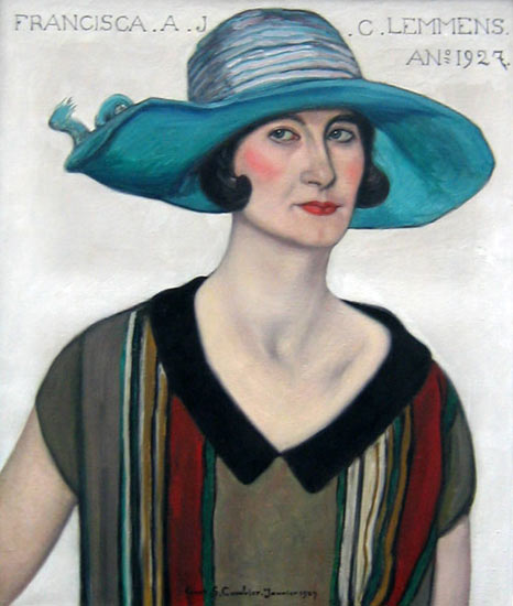 Portrait de Francisca Lemmens